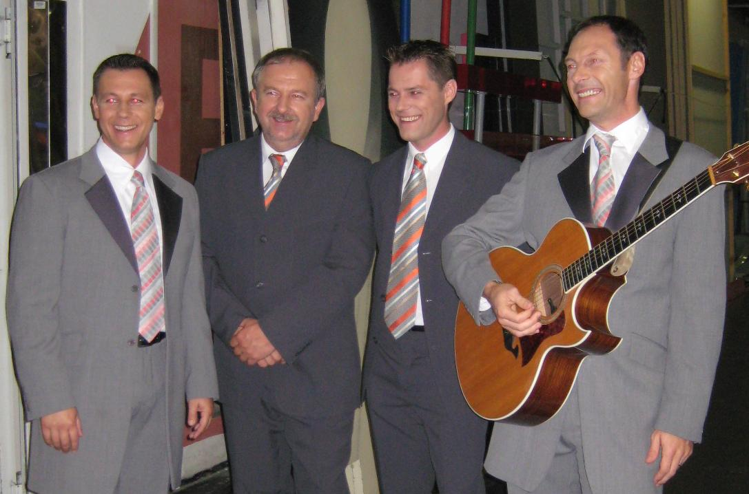 Čuki, slovenian band